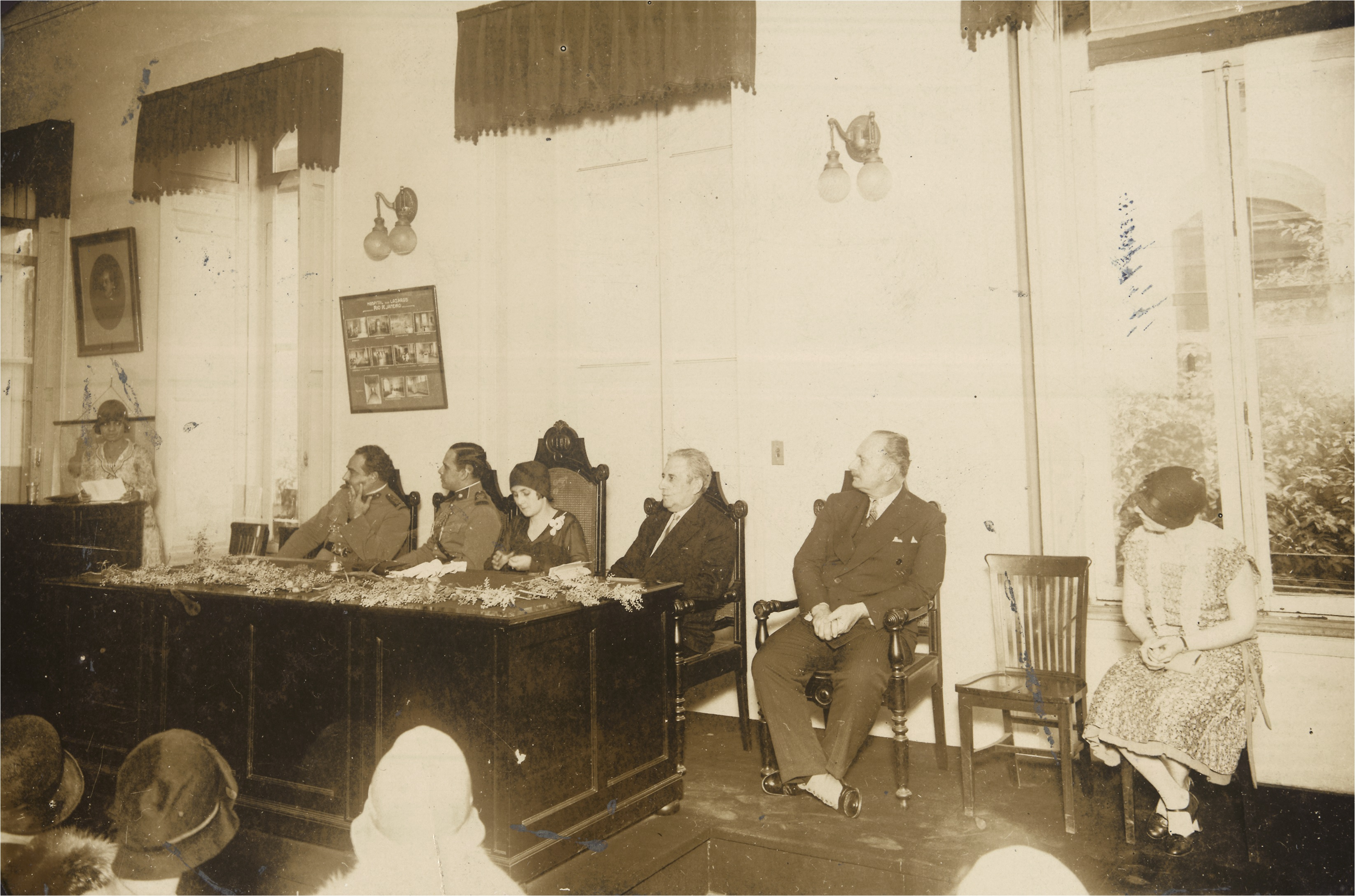 Palestra proferida por Maria Rita Soares de Andrade na Federação Brasileira pelo Progresso Feminino – FBPF no Rio de Janeiro. Fundo: Federação Brasileira pelo Progresso Feminino.